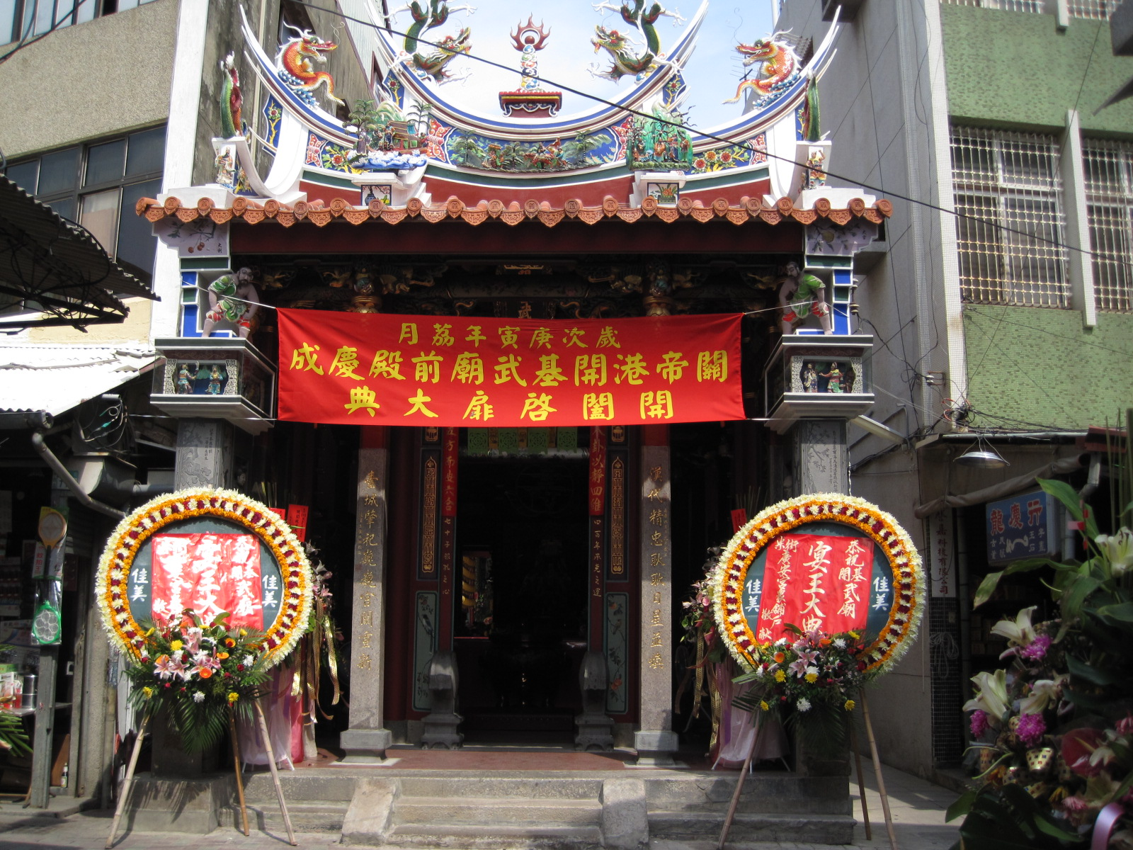 臺南開基武廟原正殿